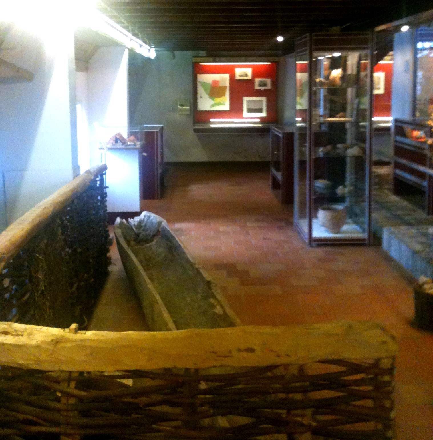 De tijdbalk in het Historisch Museum Warsenhoeck vertelt bezoekers de geschiedenis van het gebied van 300.00 jaar v.c. tot het jaar 1850.